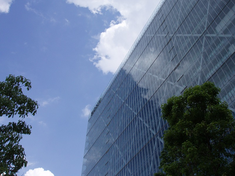 ソニー株式会社本社（東京都港区） 2007年5月31日 投稿者が撮影